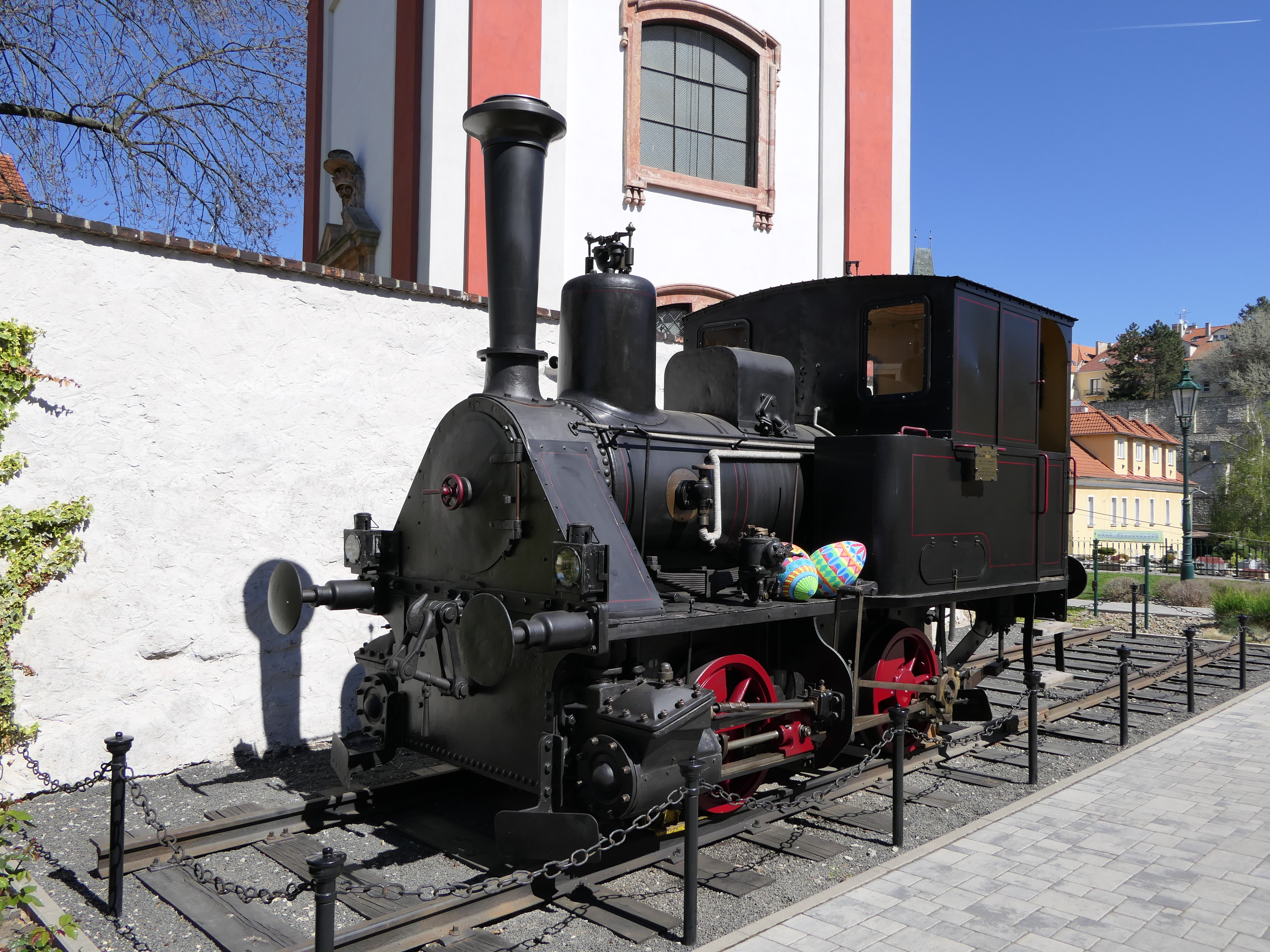 Lokomotive Krauss München bn2t - Nr. 3625, Baujahr 1897